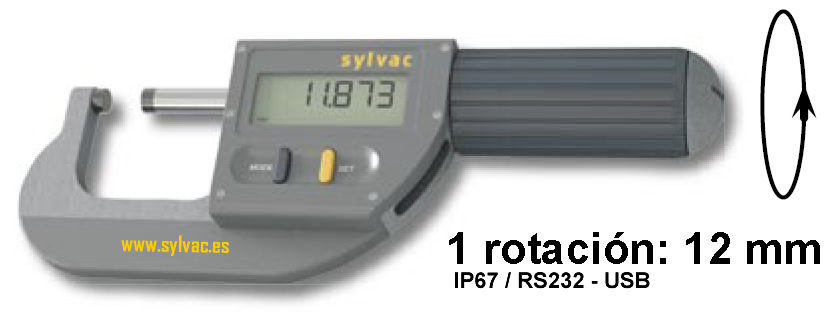 Micrómetro digital milesimal